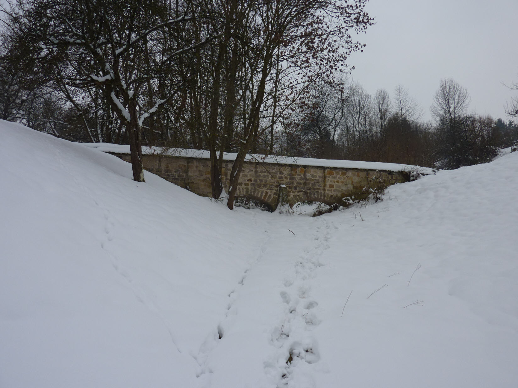 Aquädukt in Esslingen-Obertal